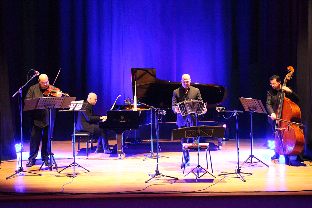 ContraMilonga Quartet in concerto. Fabio Furia, bandoneon Gianmaria Melis, violino Marcello Melis, pianoforte Massimo Battarino, contrabbasso